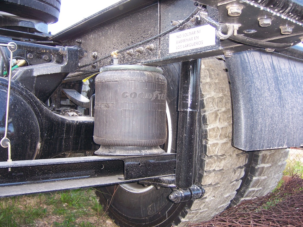 Parte del sistema de suspensión de un camión.